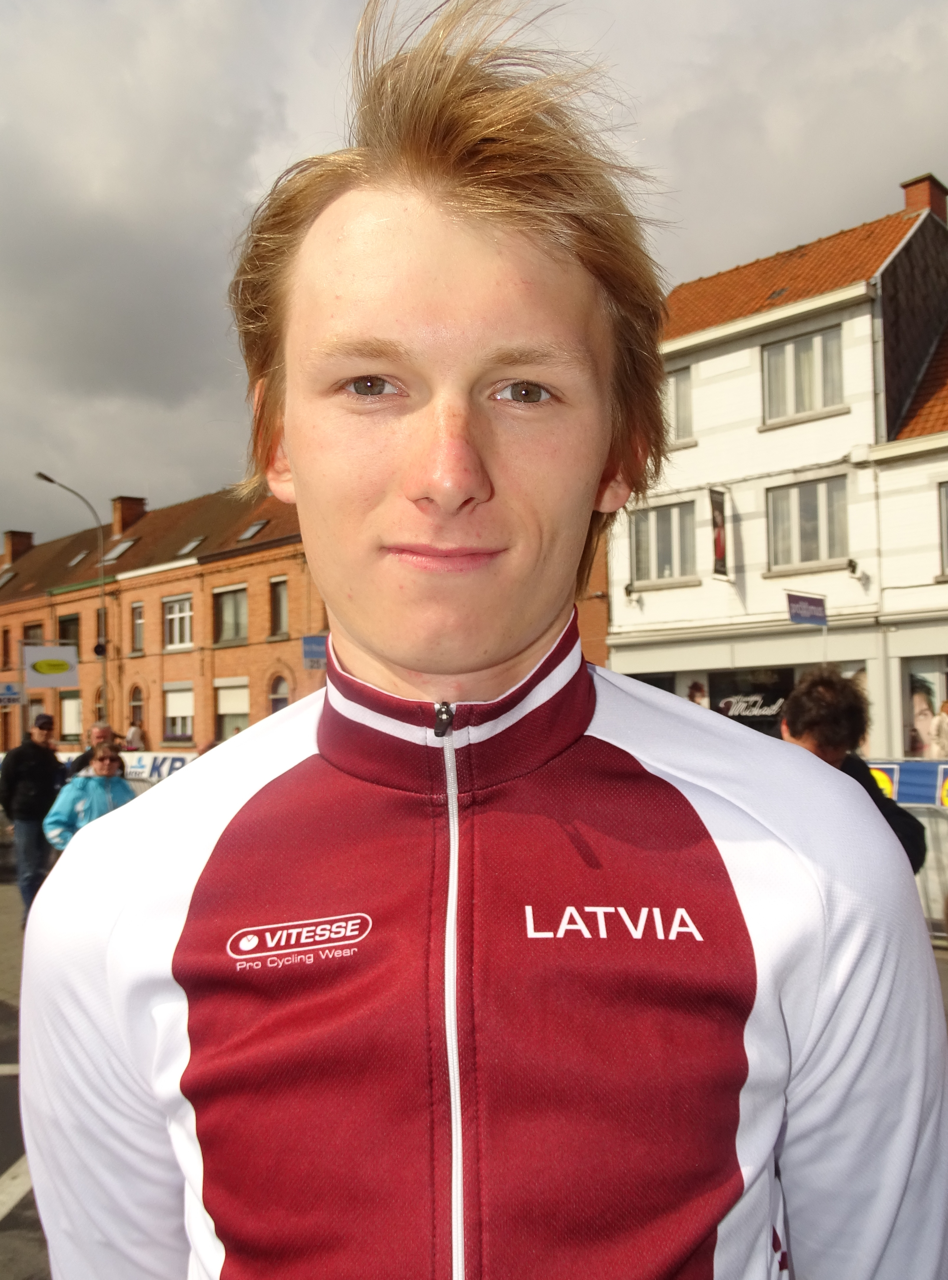 Reportage réalisé le samedi 11 avril à l'occasion du départ et de l'arrivée du Tour des Flandres espoirs 2015 à Audenarde, Belgique.